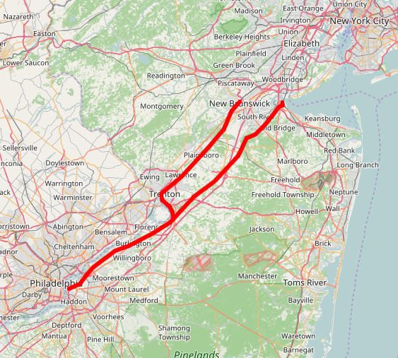 Streckennetz der Camden and Amboy Railroad